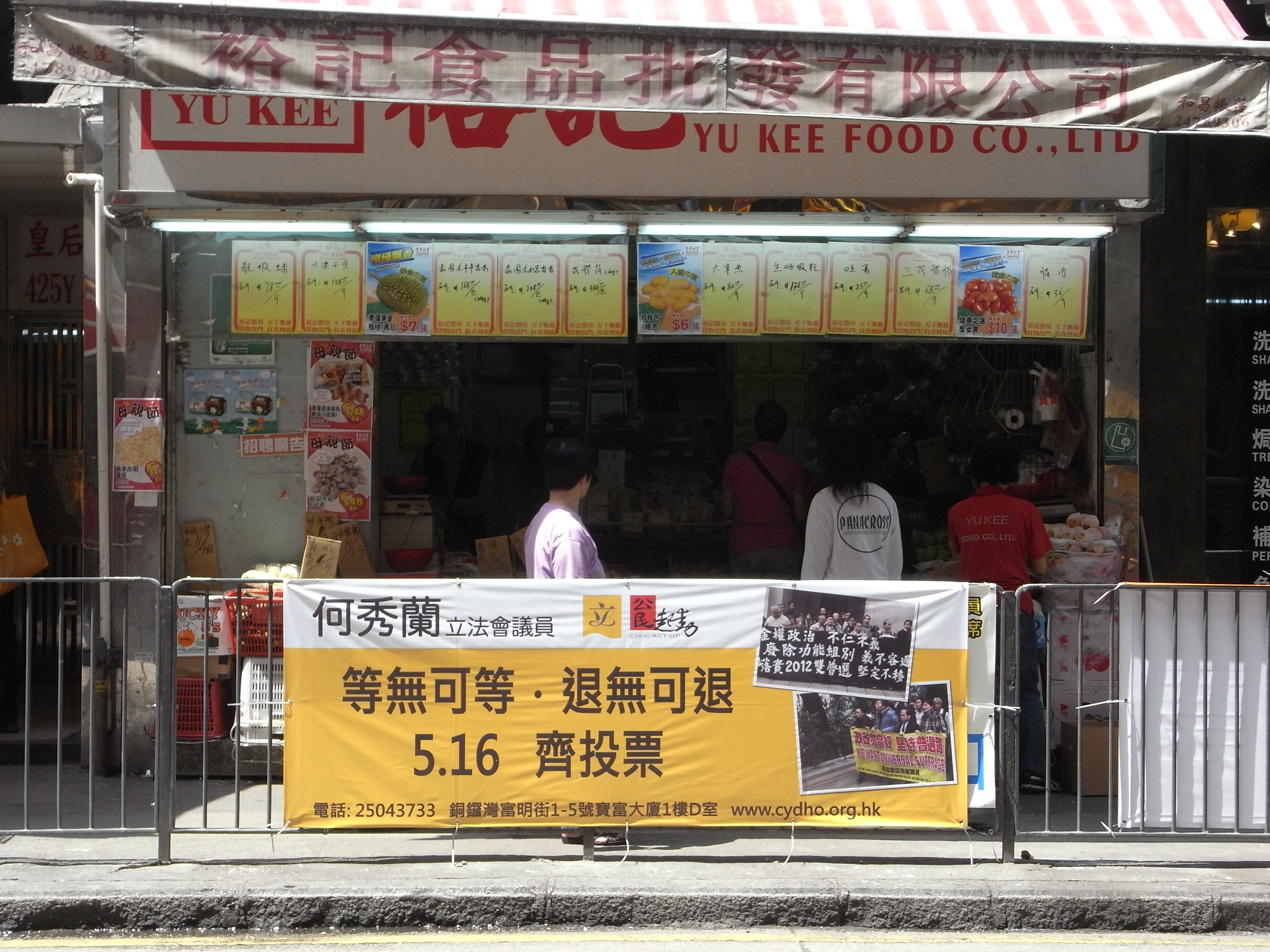 2010年香港立法會地方選區補選